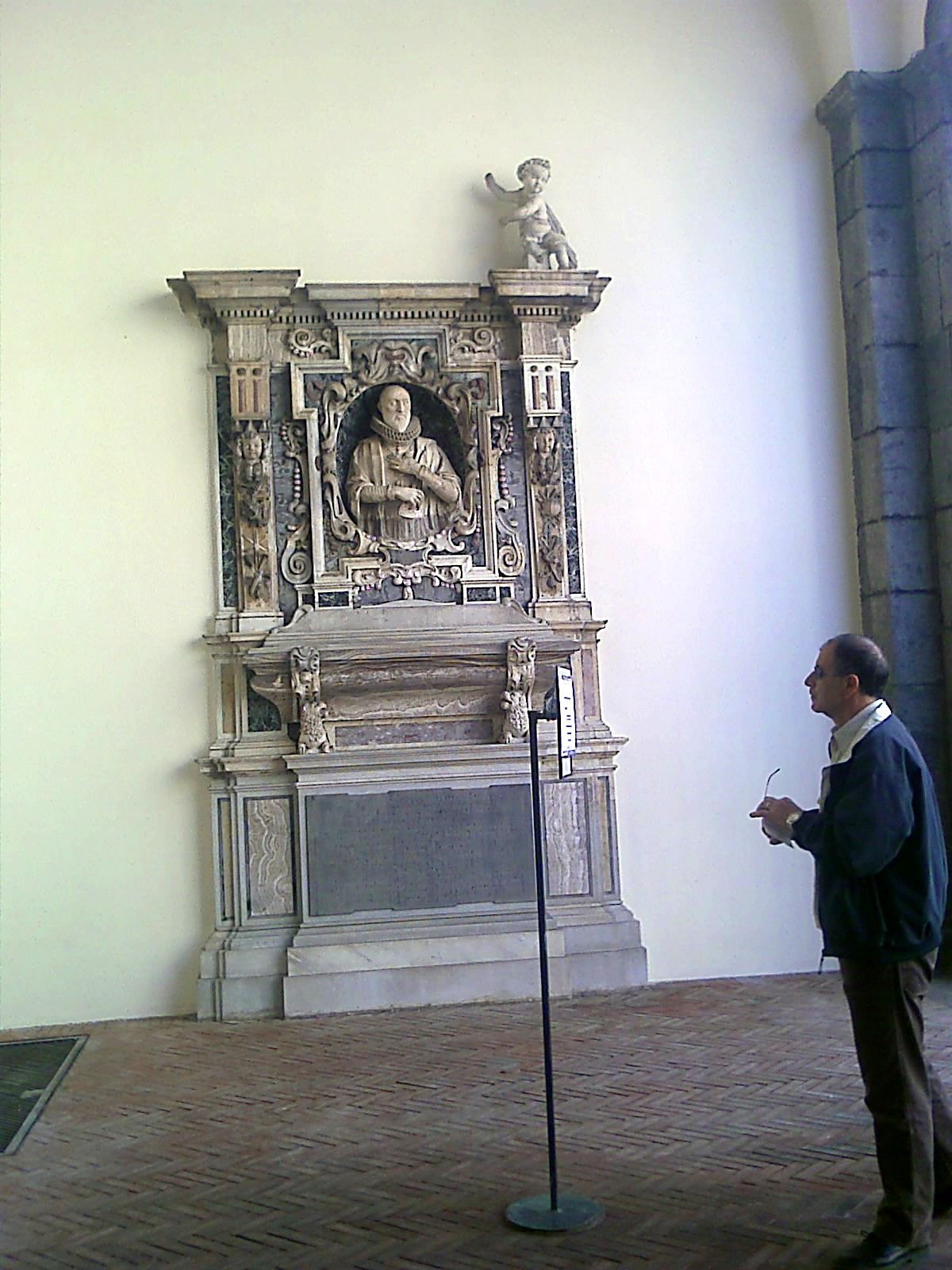 Domenico Fontana grave